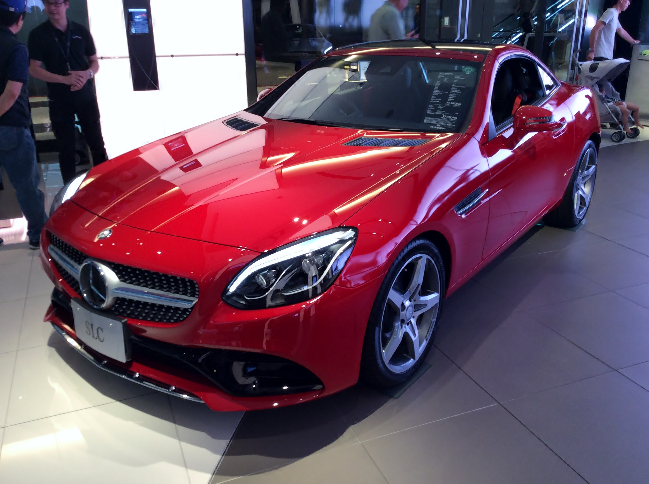 R172型メルセデス・ベンツ・SLC180スポーツをフロントから撮影。